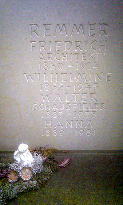 Das Familiengrab des Architekten Friedrich Remmer (1850 - 1914), Ehefrau Wilhelmine Remmer (1855 - 1945), Schauspieler Walter Remmer (1887 - 1973) und Hanna Remmer (1889 - 1981) auf dem Neuer St.-Nikolai-Friedhof Hannover in der Nordstadt von Hannover ...